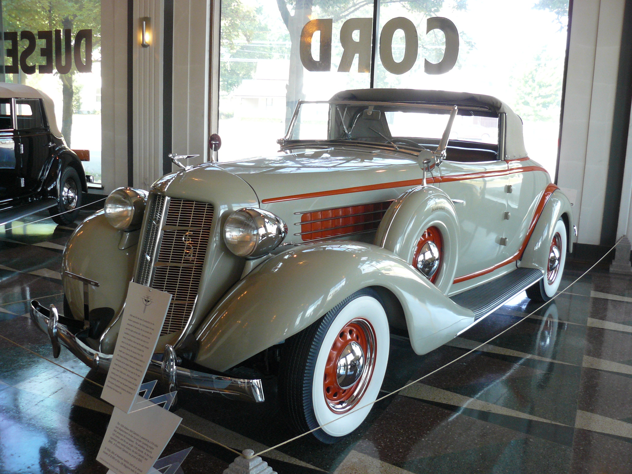 Auburn Muséum 2013